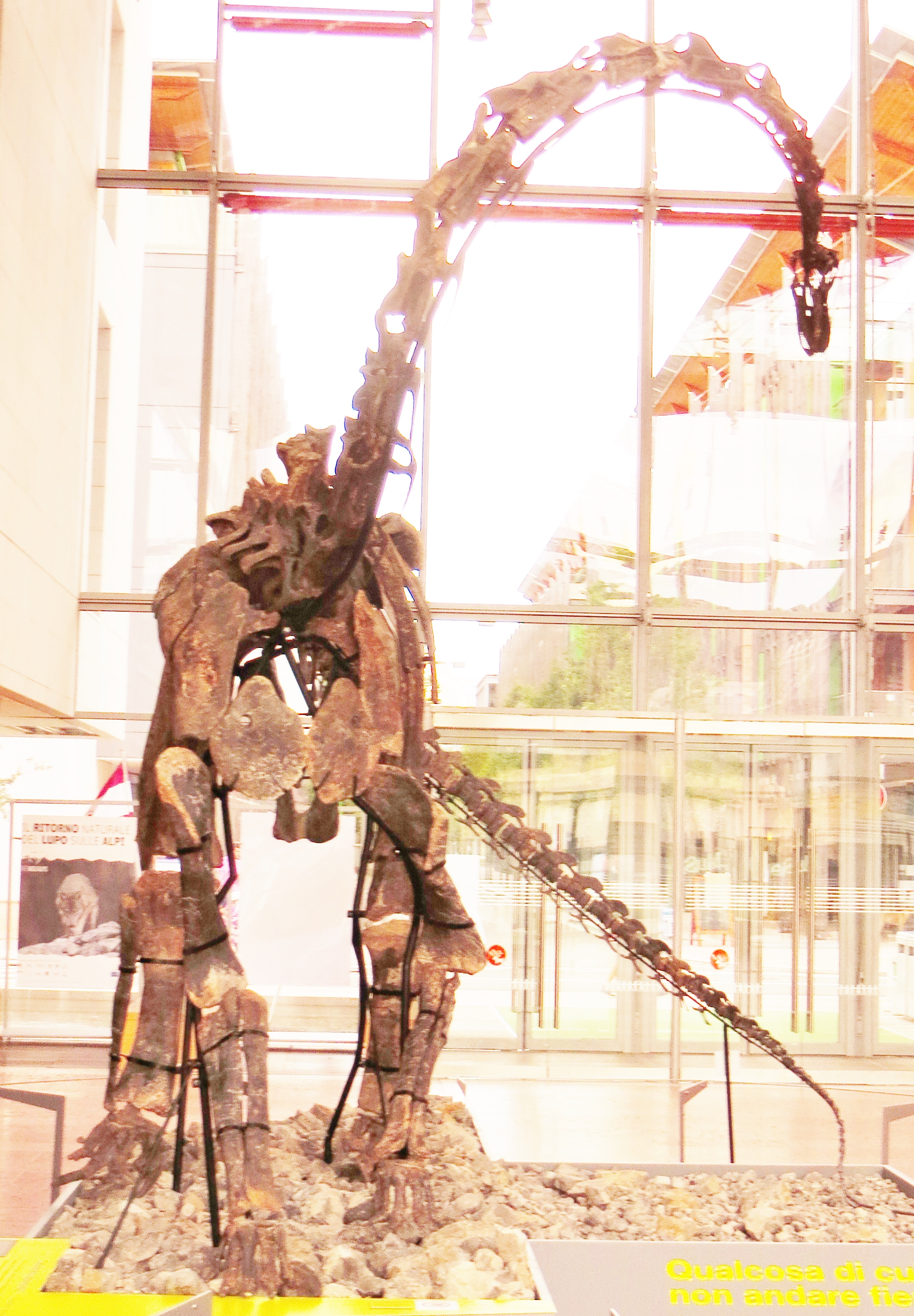 Fossil of Kaatedocus - Took the picture at Muse, Trento